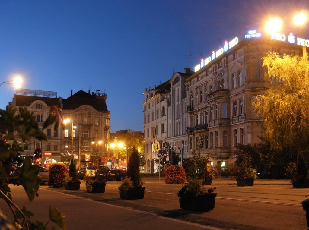 Plac Teatralny w Bydgoszczy